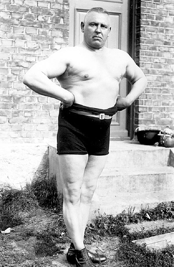 Saaremaa raskejõustiklane ja vägimees.